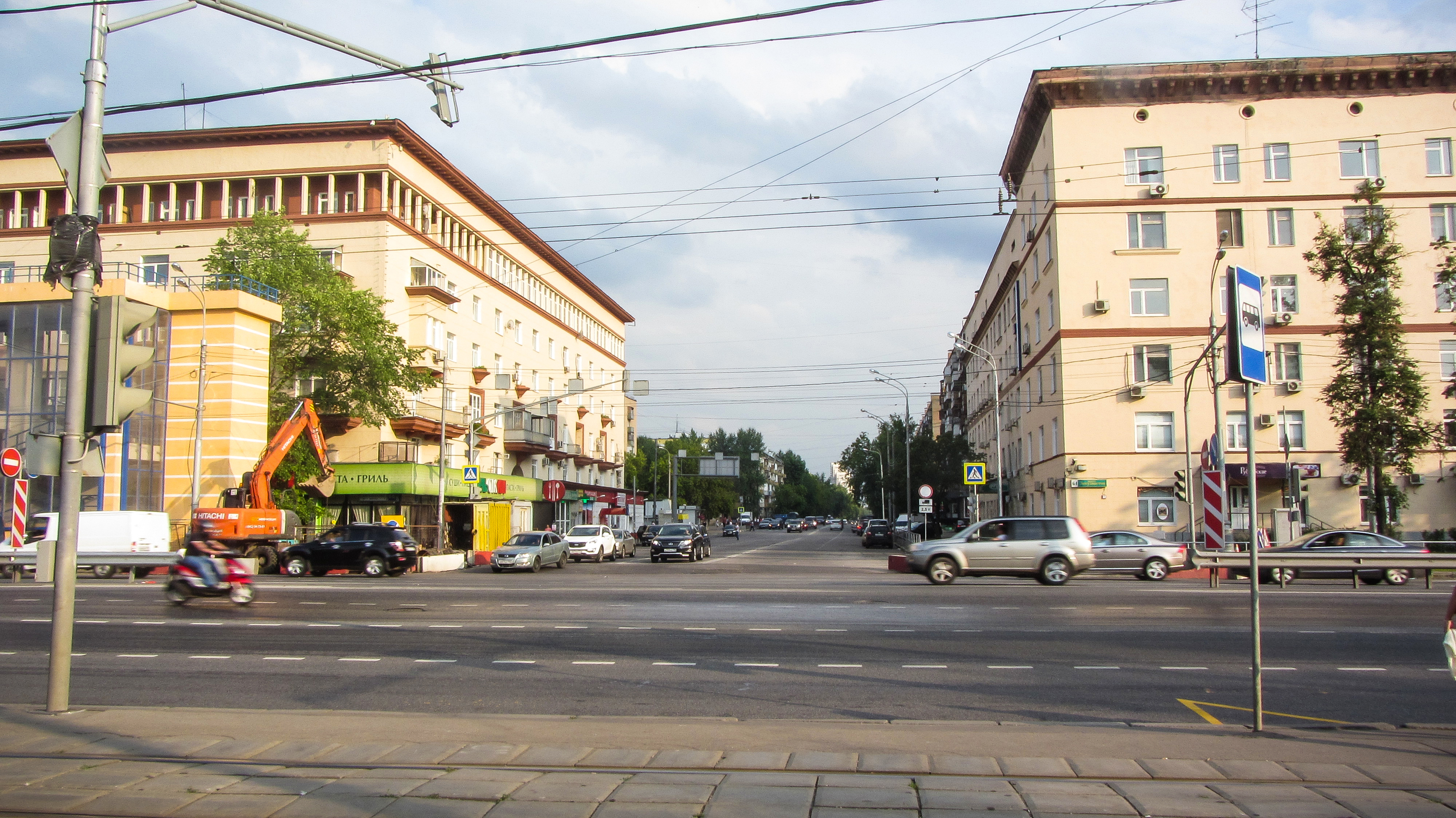 2-я Владимирская улица на пересечении с шоссе Энтузиастов